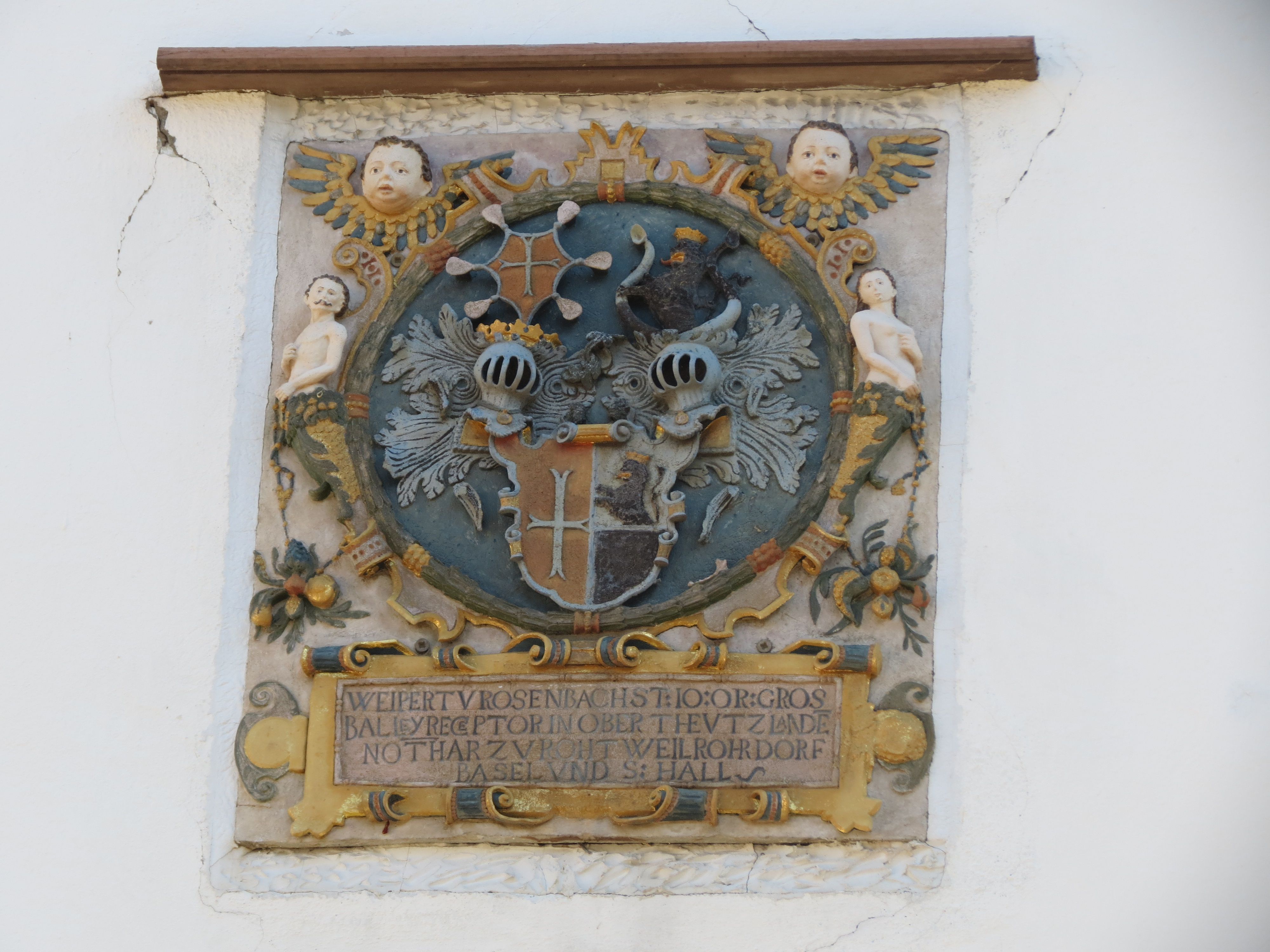 Rohrdorf, Lkr.Calw, Eingang ehemalige Komturei (heutiges Rathaus), Wappen Wiprecht von Rosenbach, Kommendator in Rohrdorf, Rottweil und Schwäbisch Hall, um 1600